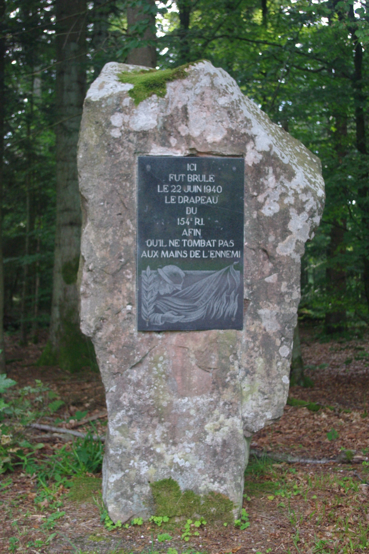 Monument érigé en souvenir de la crémation du drapeau de 154e RI par ses officiers afin qu'il ne tombât pas aux mains de la Wehrmacht. Ce monument est localisé au lieu-dit Etoile 1, le long de la route forestière reliant le col du Donon au col de Prayé.